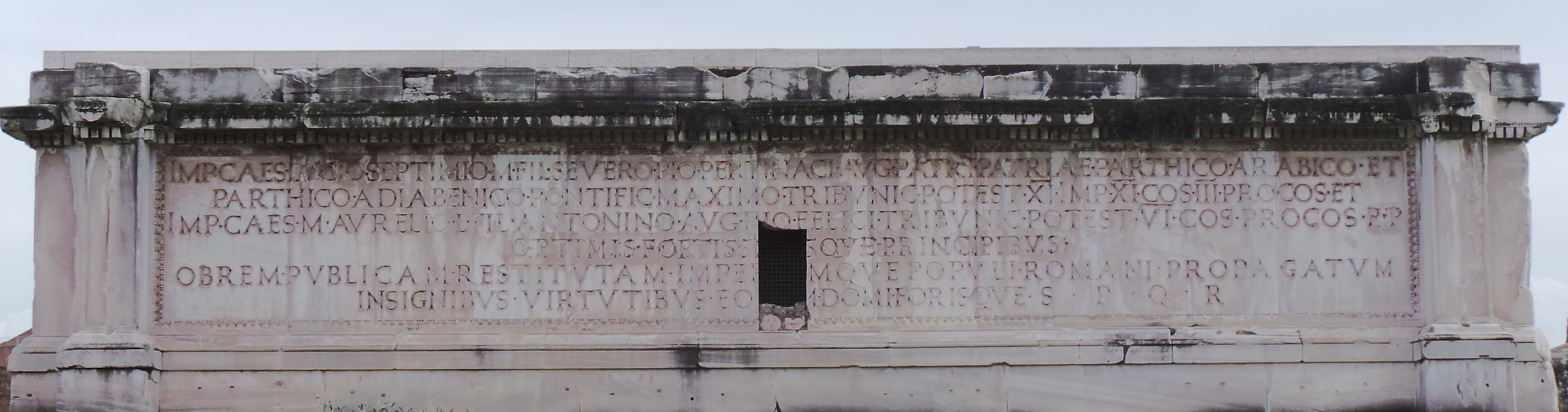 Dedikationsinschrift (Nordwestseite)